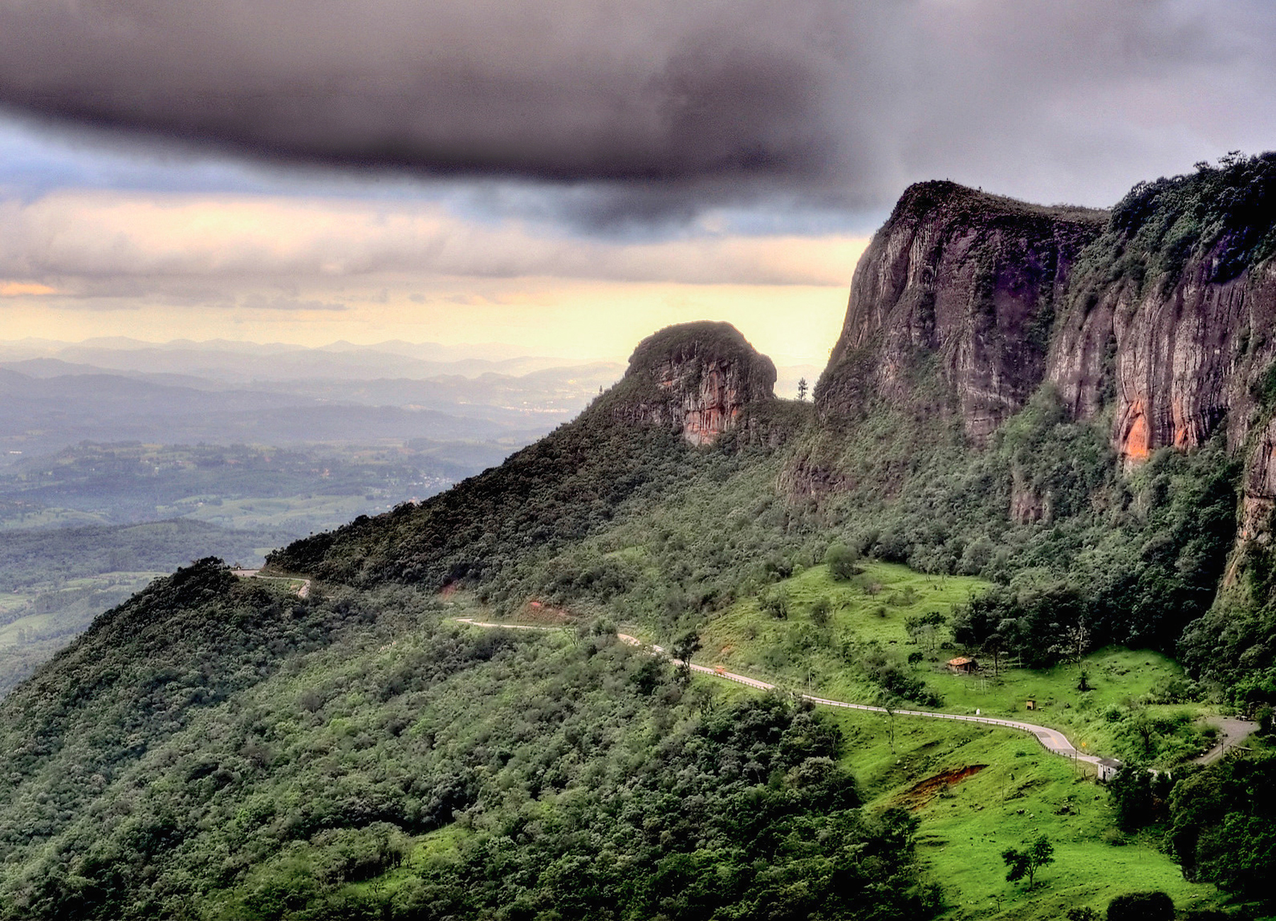 A Serra do Rio do Rastro é uma das serras de Santa Catarina, localizada no sul do estado. É cortada pela rodovia SC-390, onde se tem uma espetacular vista da serra. Com muitas matas e cachoeiras, é um dos cartões-postais do estado. O Quati (Nasua sp.) é um mamífero nativo que ocasionalmente aparece no mirante vindo das matas próximas.